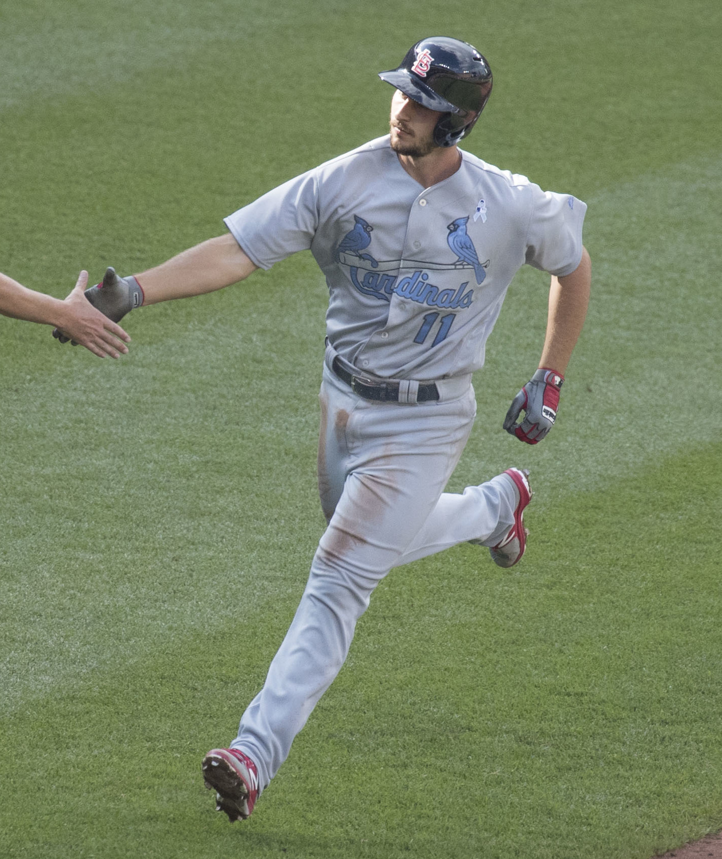 Cardinals at Orioles 6/17/17